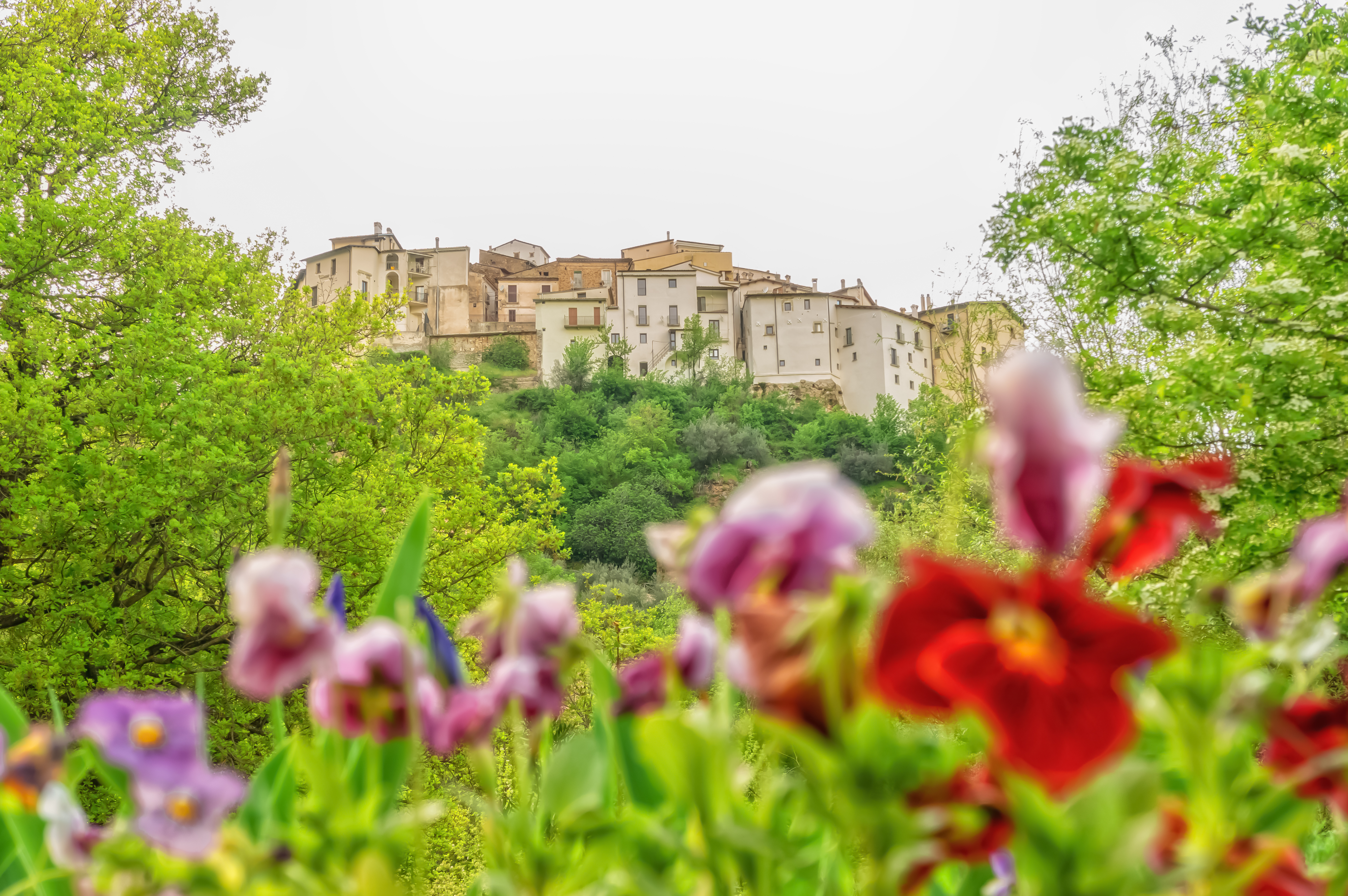 riserva naturale guidata Gole del Sagittario This is a photo of a monument which is part of cultural heritage of Italy. The authorisation for taking photos of this object was provided by the World Wide Fund for Nature Italy.